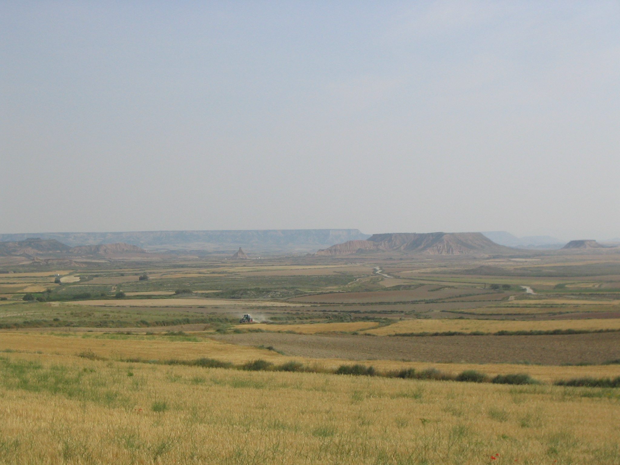 Paisaje de las Bardenas Reales de Navarra, panorámica. Al fondo El Plano y, delante de él el Castildetierra.